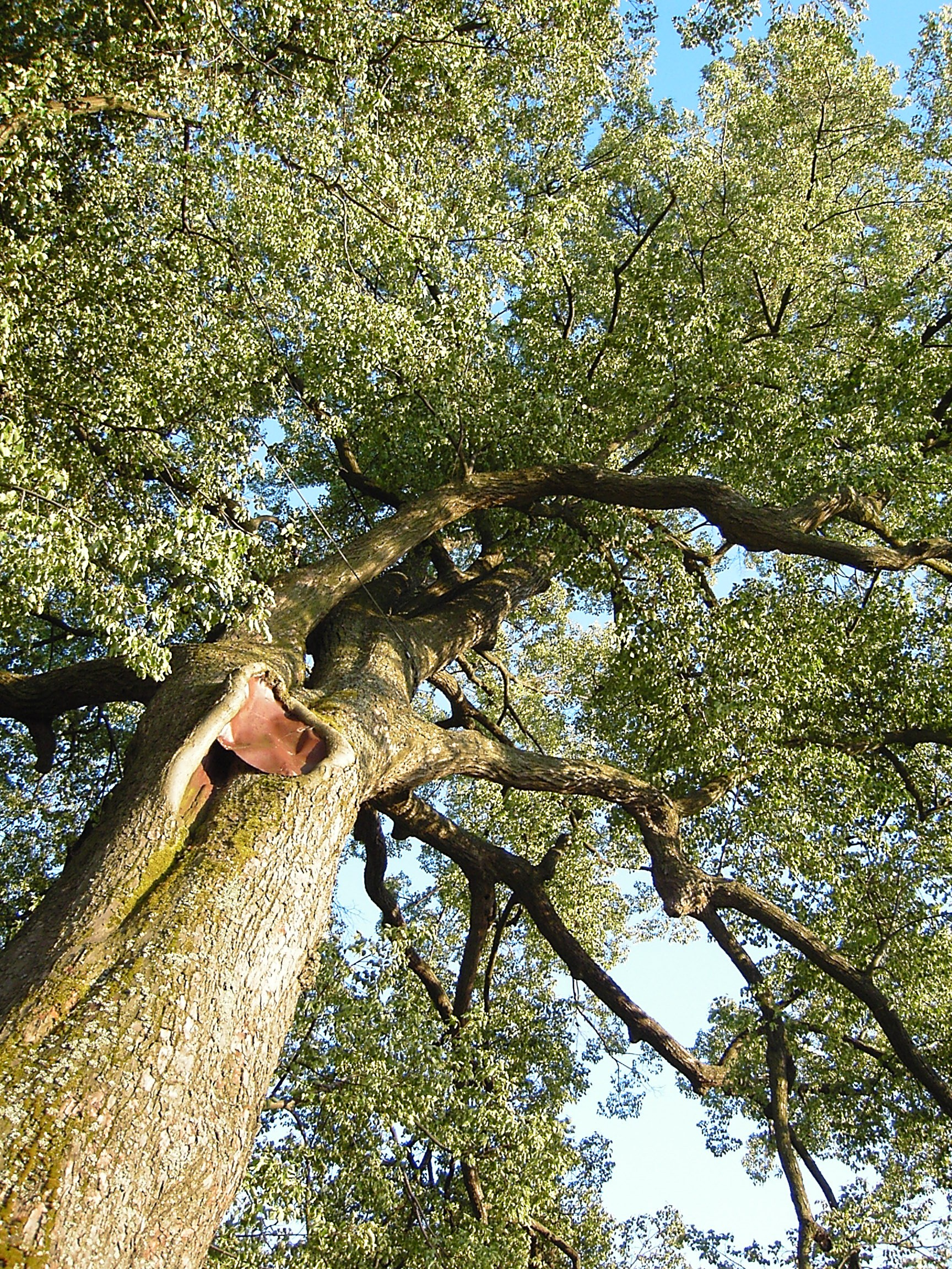 Koruna staré lípy v obci Lipka u Horního Bradla